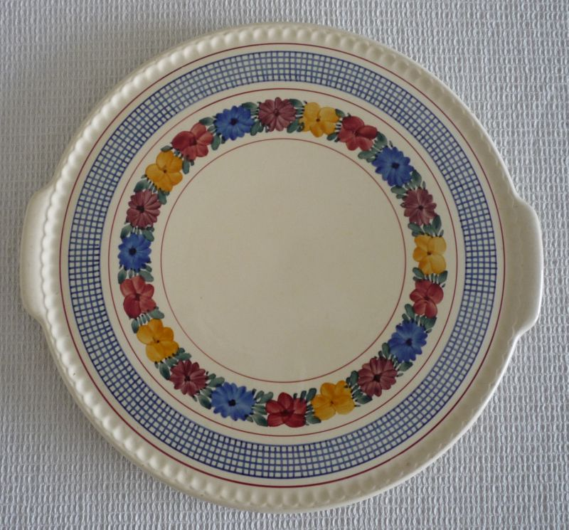 Kuchenplatte mit Tragegriffen von "Villeroy & Boch", Dekor "Goslar", 1930er Jahre